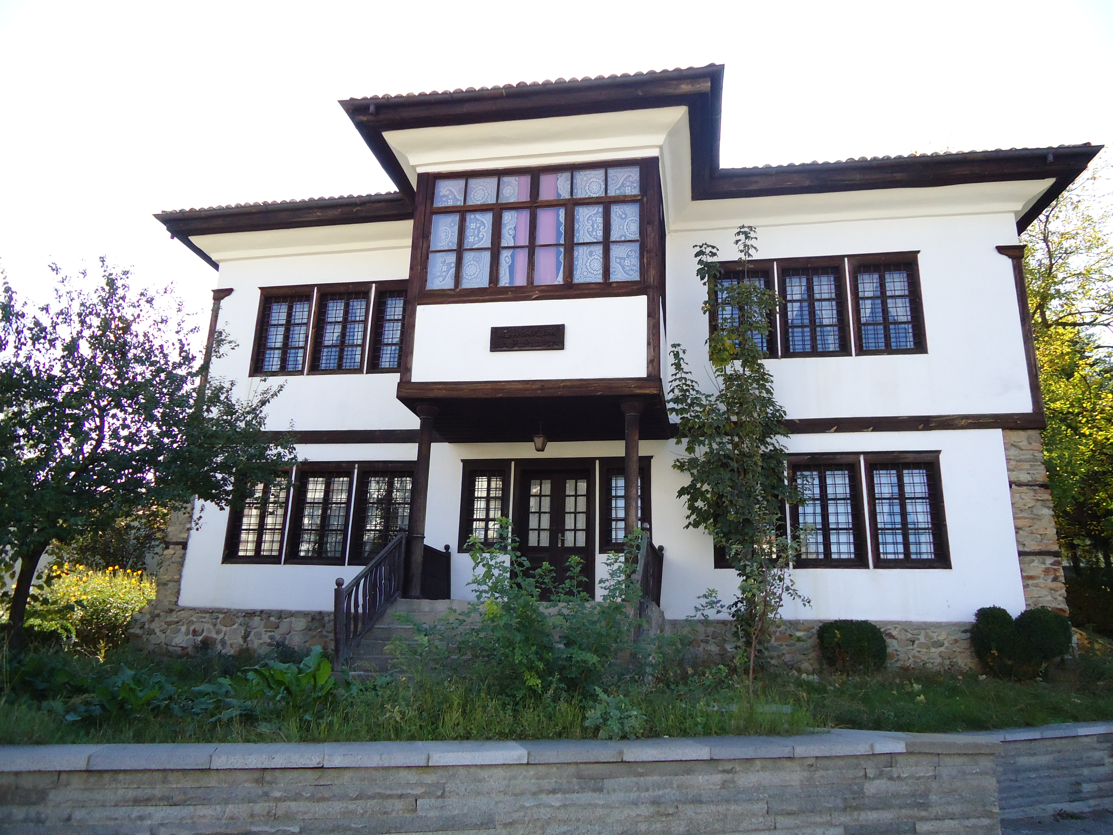 Къщата на Ильо войвода в гр.Кюстендил